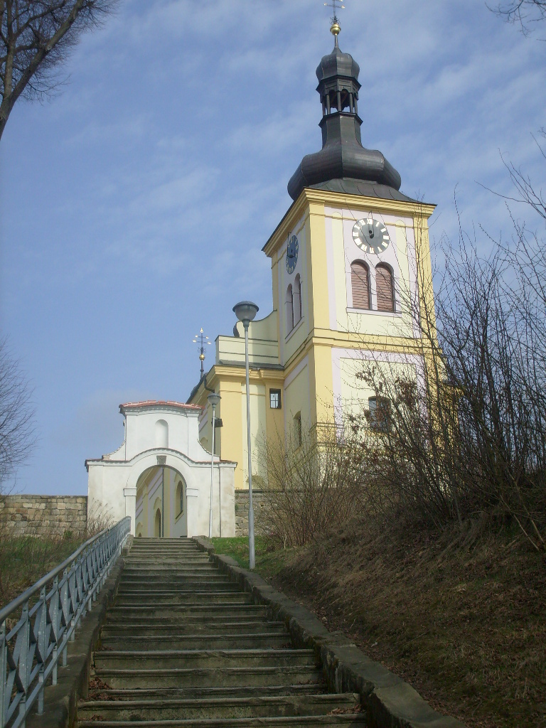 Kostel svatého Martina, Markvartice (okres Děčín).